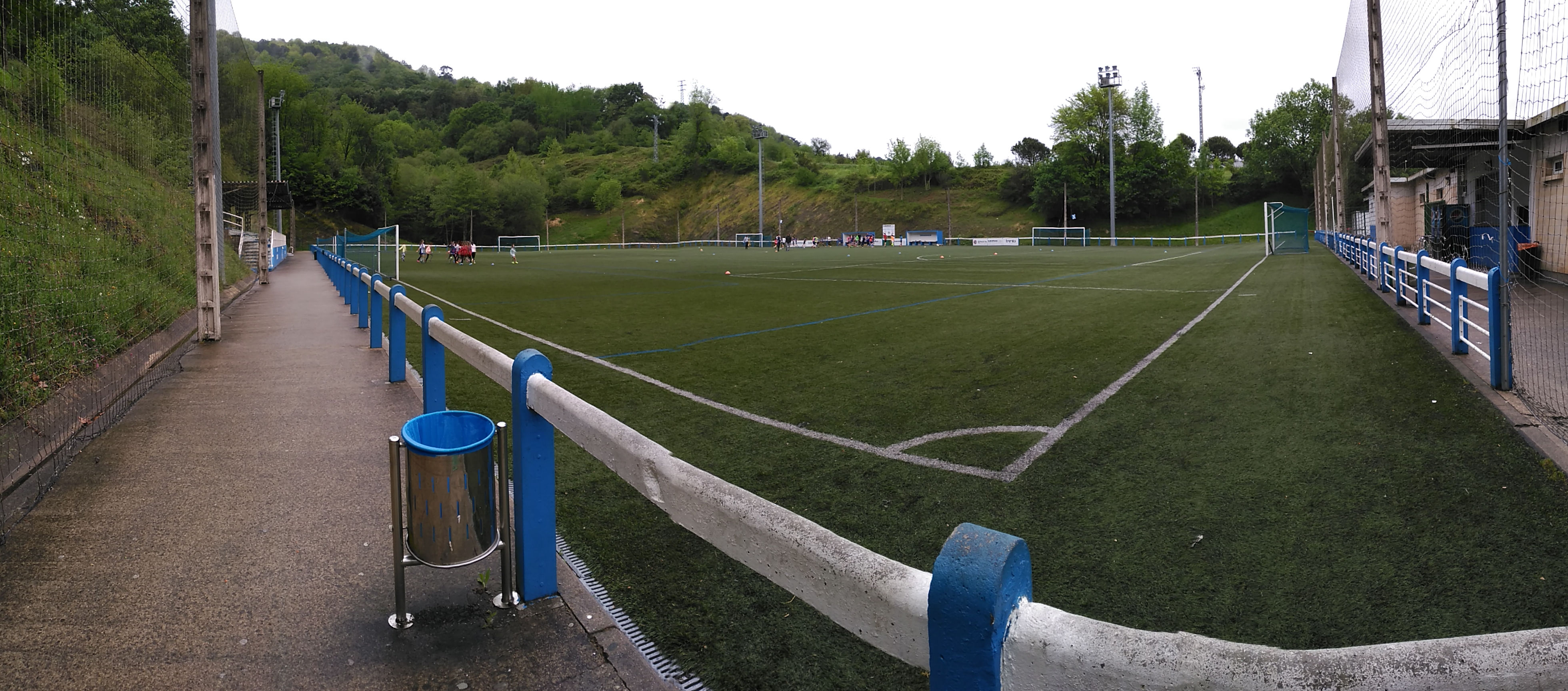 Berio futbol zelaia (futbol 11)